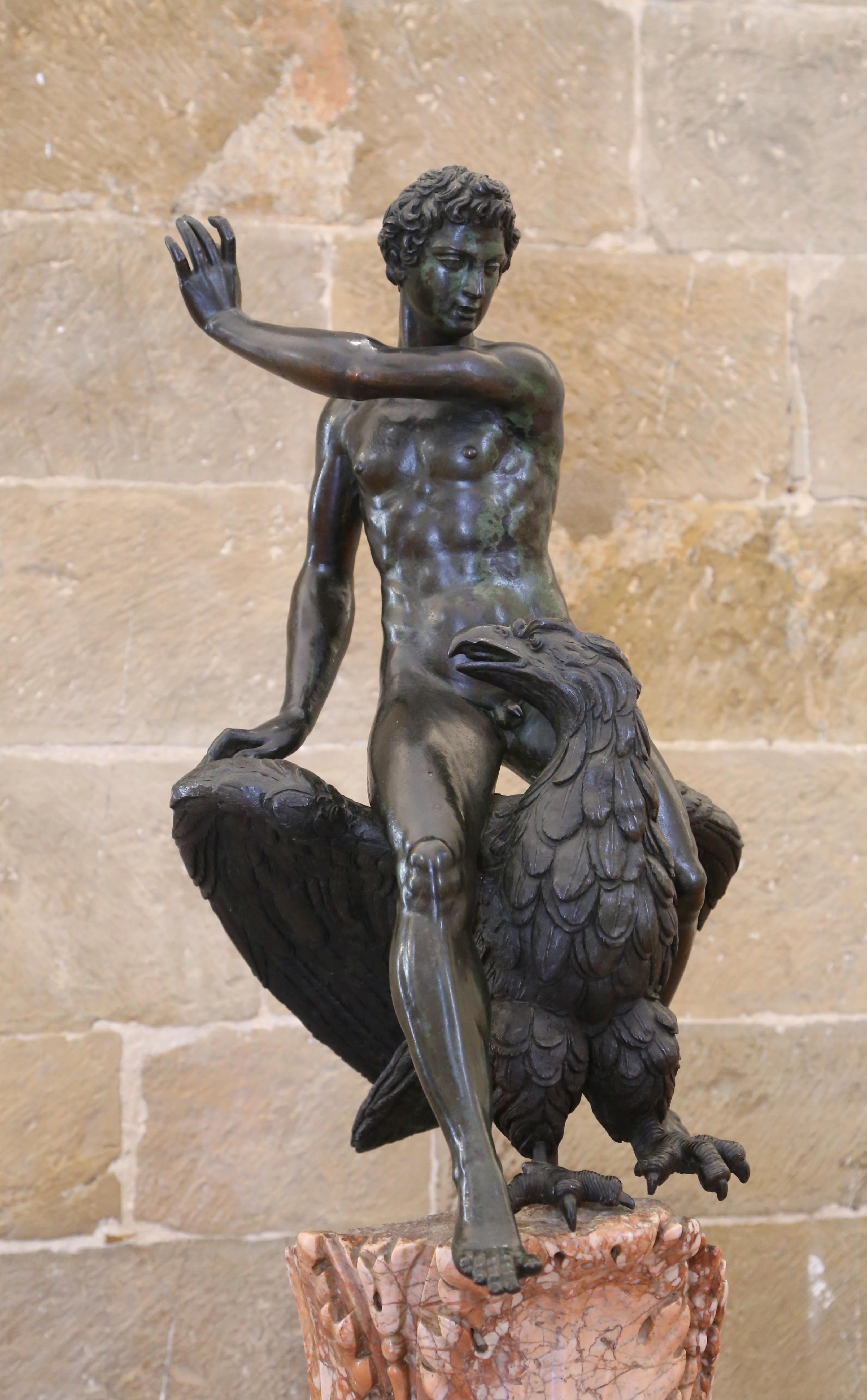 Ganymed, Bartolomeo Ammannati attr., ca. 1560, Museo del Bargello, Florenz